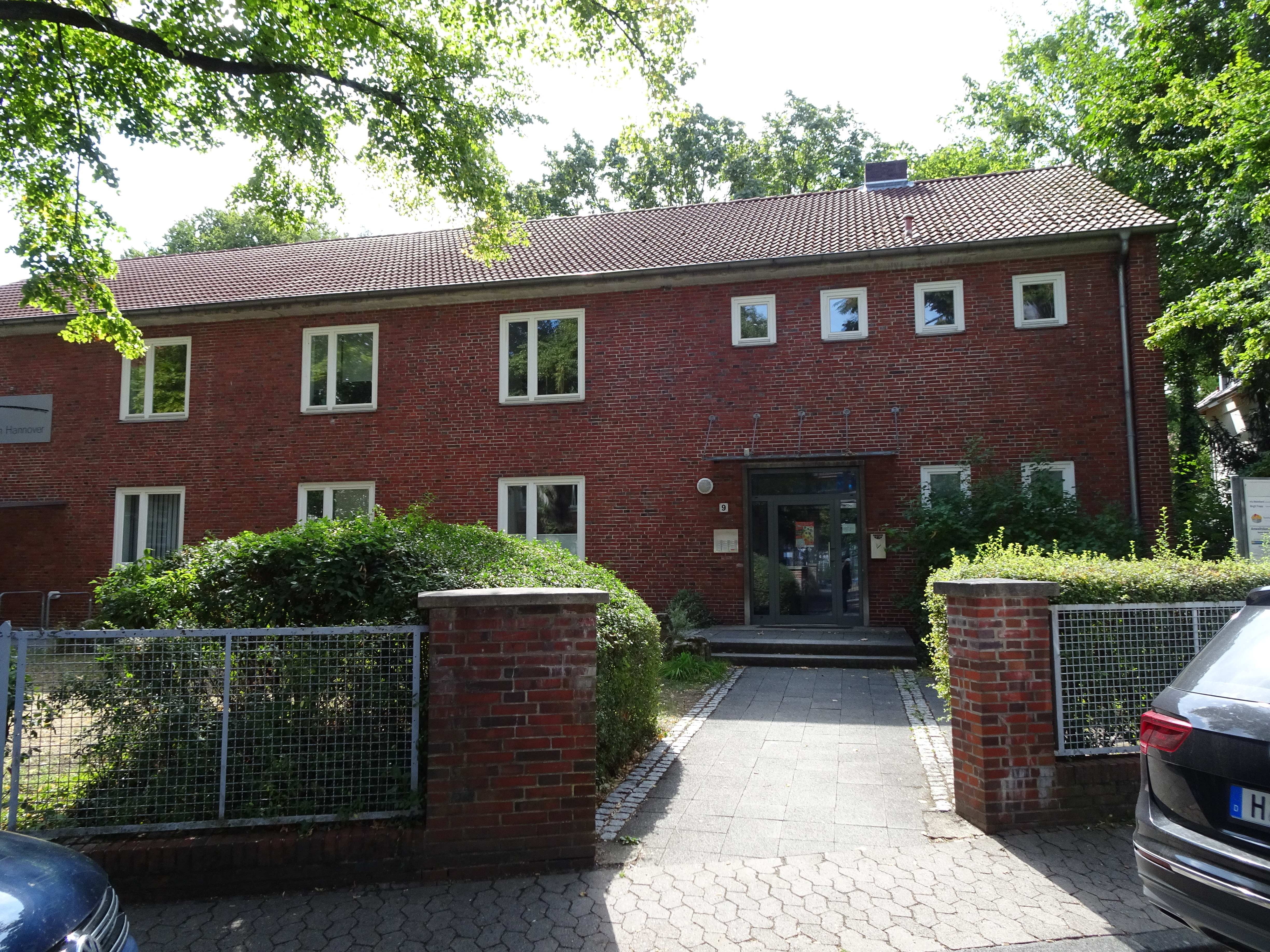 Gebäude in der Hohen Straße 9 in Hannover